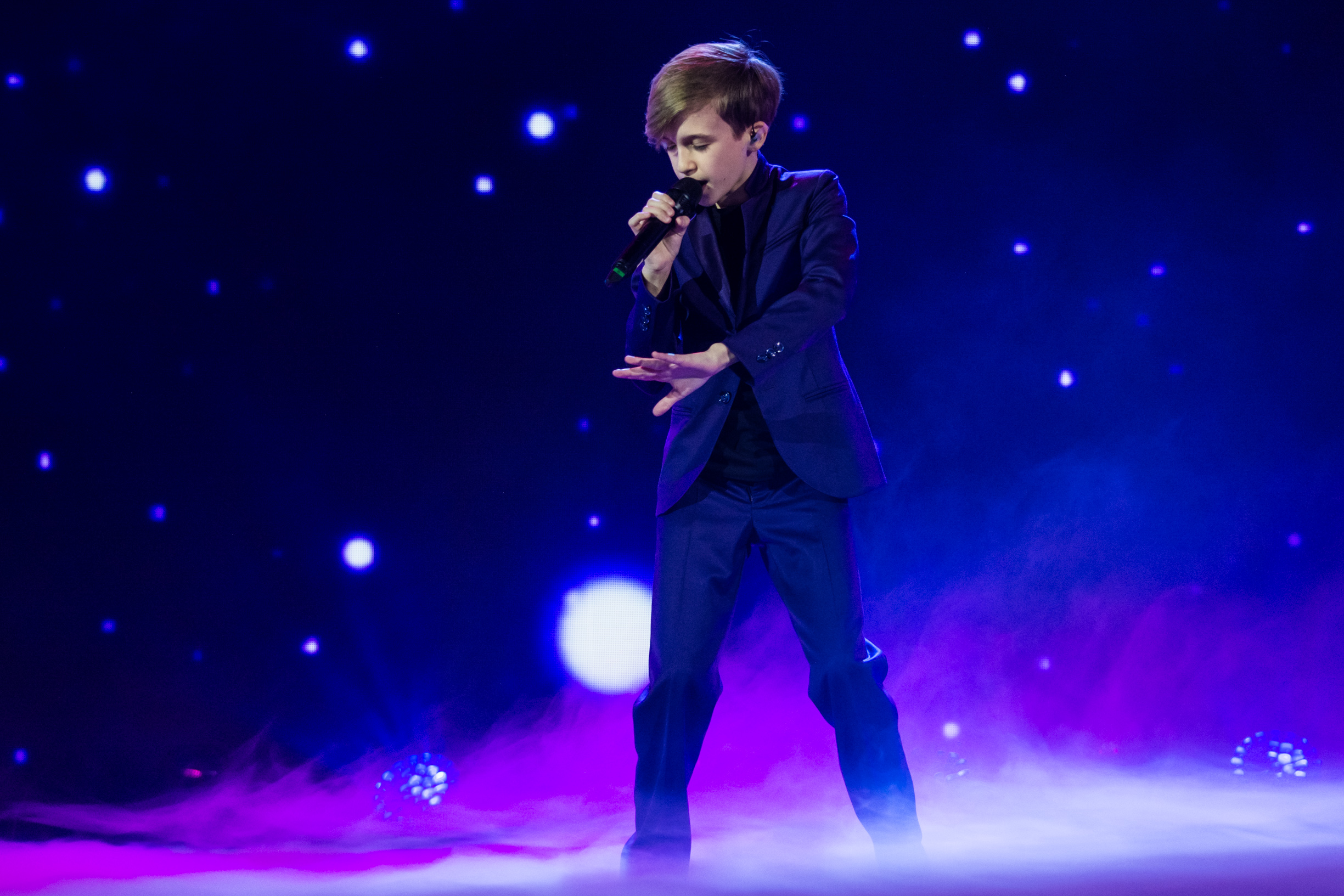 Михаил Смирнов на сцене Детского Евровидения 2015 («Армеец», София) во время генеральной репетиции